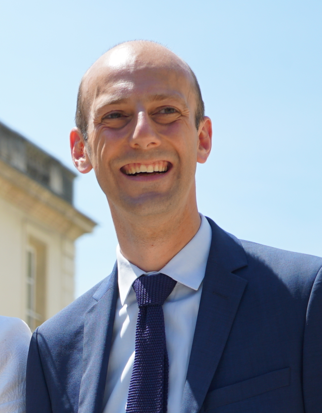 le député dans le jardin des pas perdus.